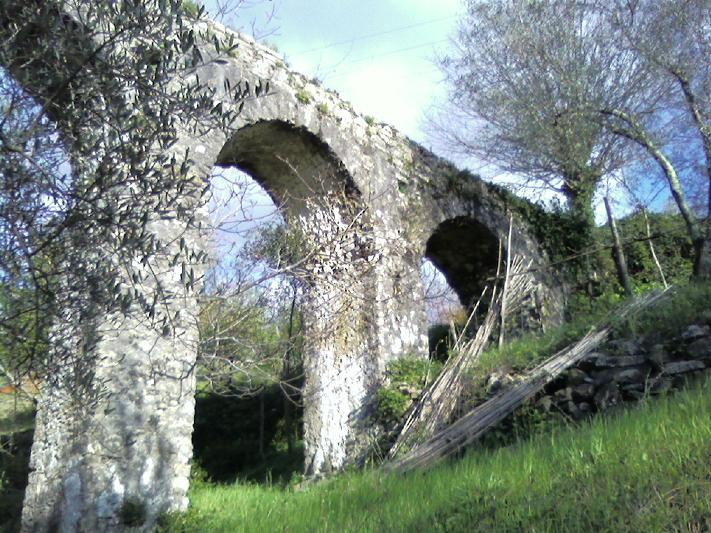 Contursi Terme (provincia di Salerno): acquedotto romano